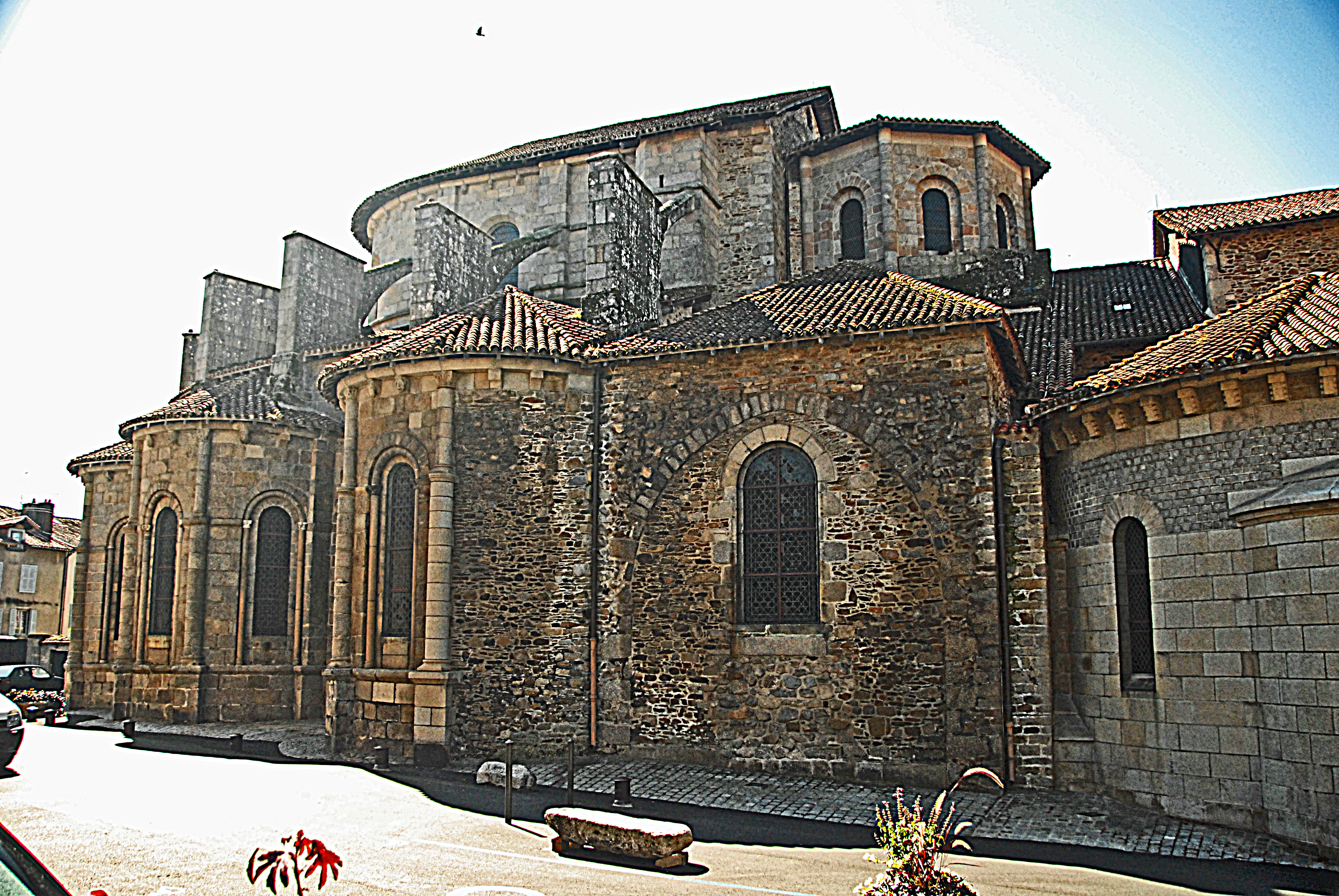 Stiftskirche St.-Léonard-de-Noblat, von N, Chorhaupt u. Querhausarm